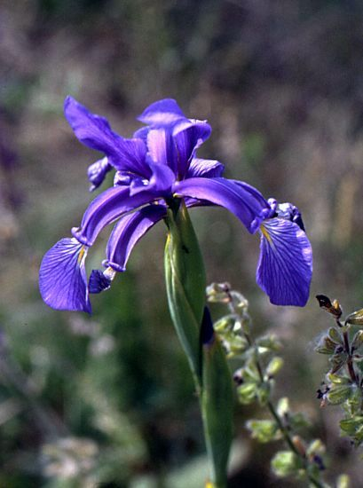 Bastard-Schwertlilie (Iris spuria), Schwertliliengewächse (Iridaceae) - Österreich/Austria/Autriche: Burgenland, Seewinkel, Götschlackenpußta